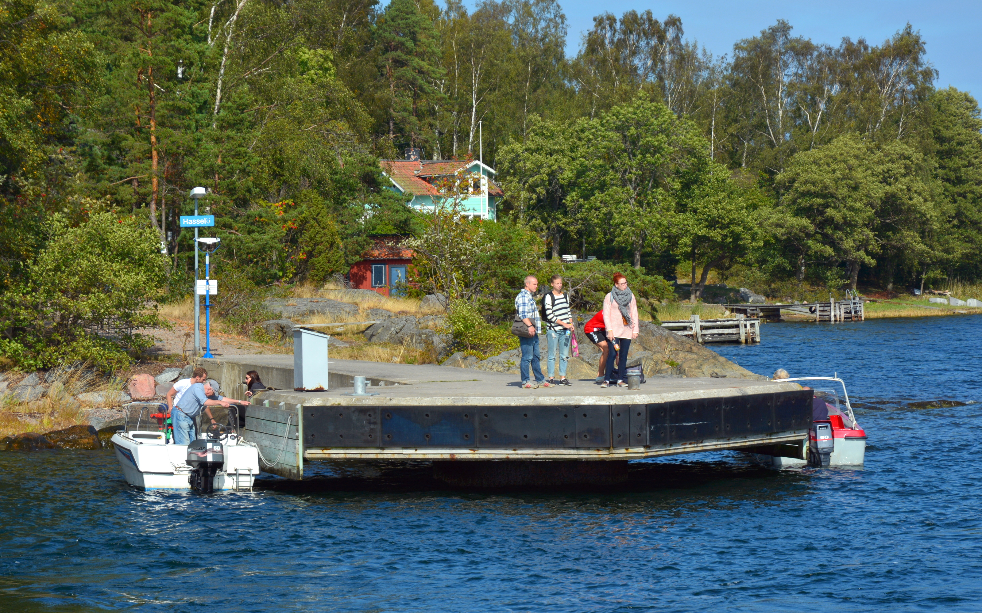 Bryggan på Hasselö i Hasselö, Stockholms skärgård.